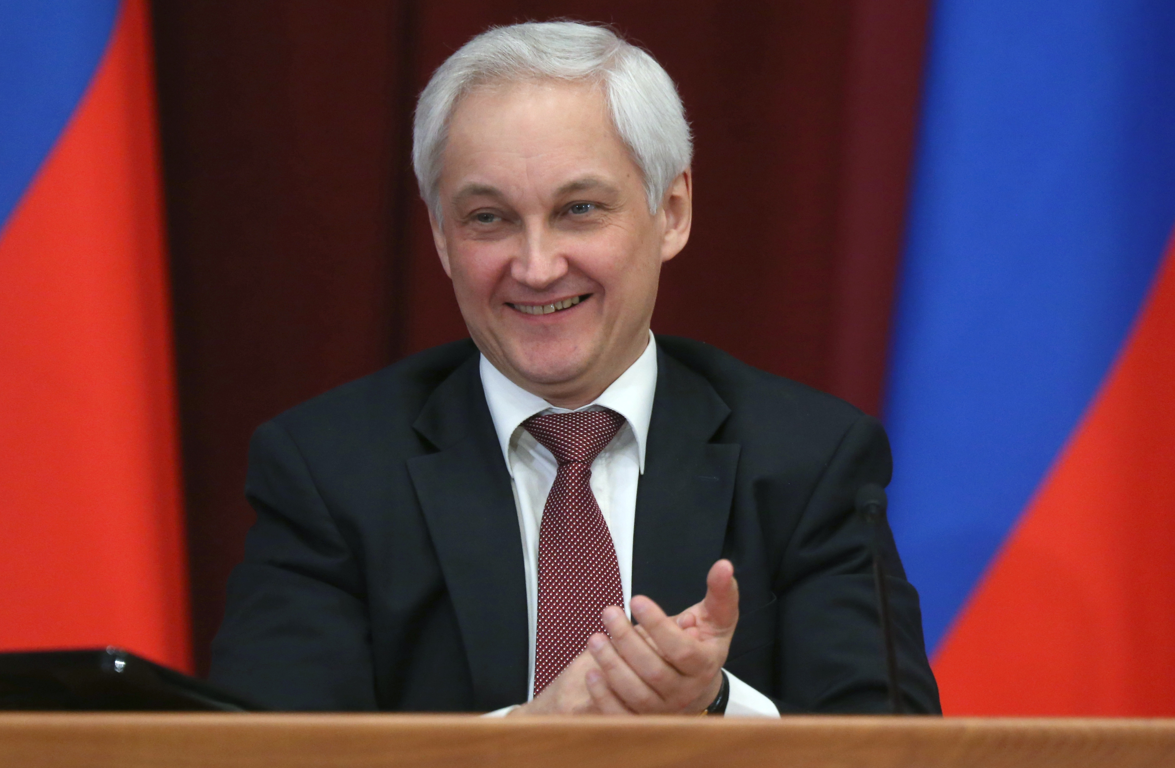 Глава Минэкономразвития Андрей Белоусов на расширенном заседании коллегии Министерства экономического развития России